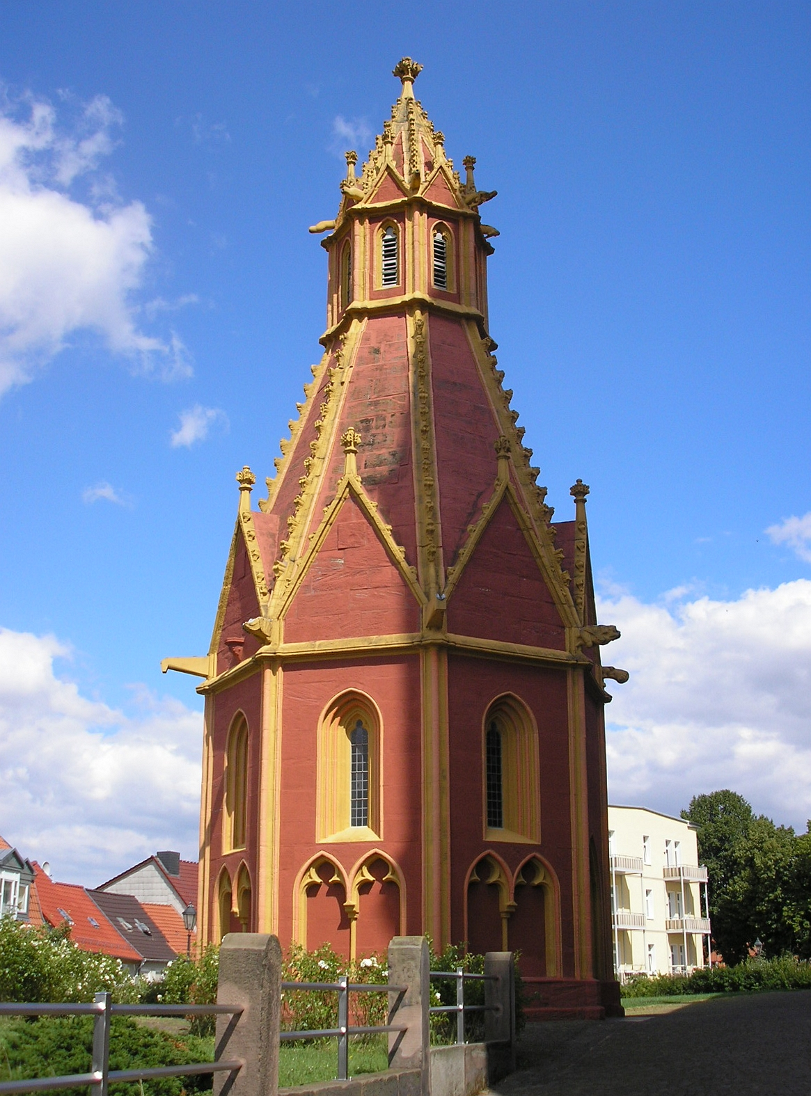 Die kleine Kapelle St. Annen neben der Kirche St. Marien in Heiligenstadt (Thüringen).